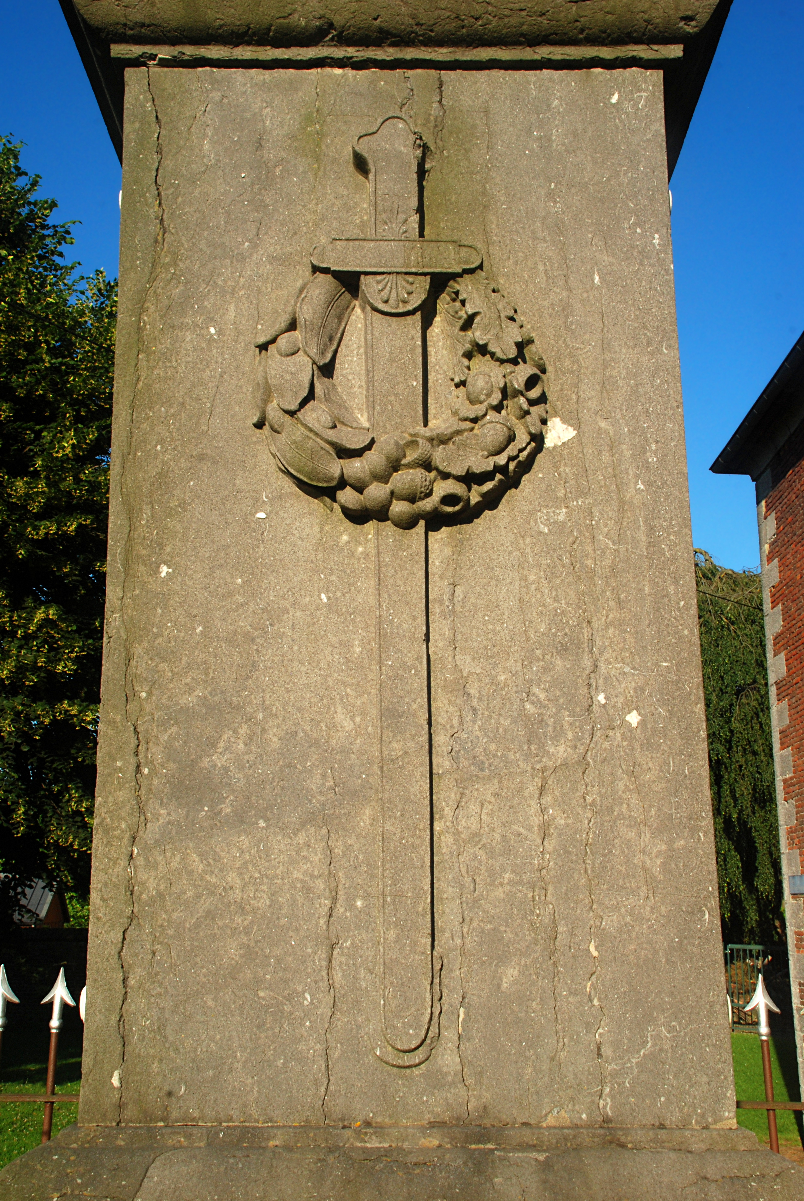 Belgique - Brabant wallon - Genappe - Ways - Mausolée Duhesme (tombe du Général Duhesme, mort des suites des blessures encourues à la bataille de Waterloo)